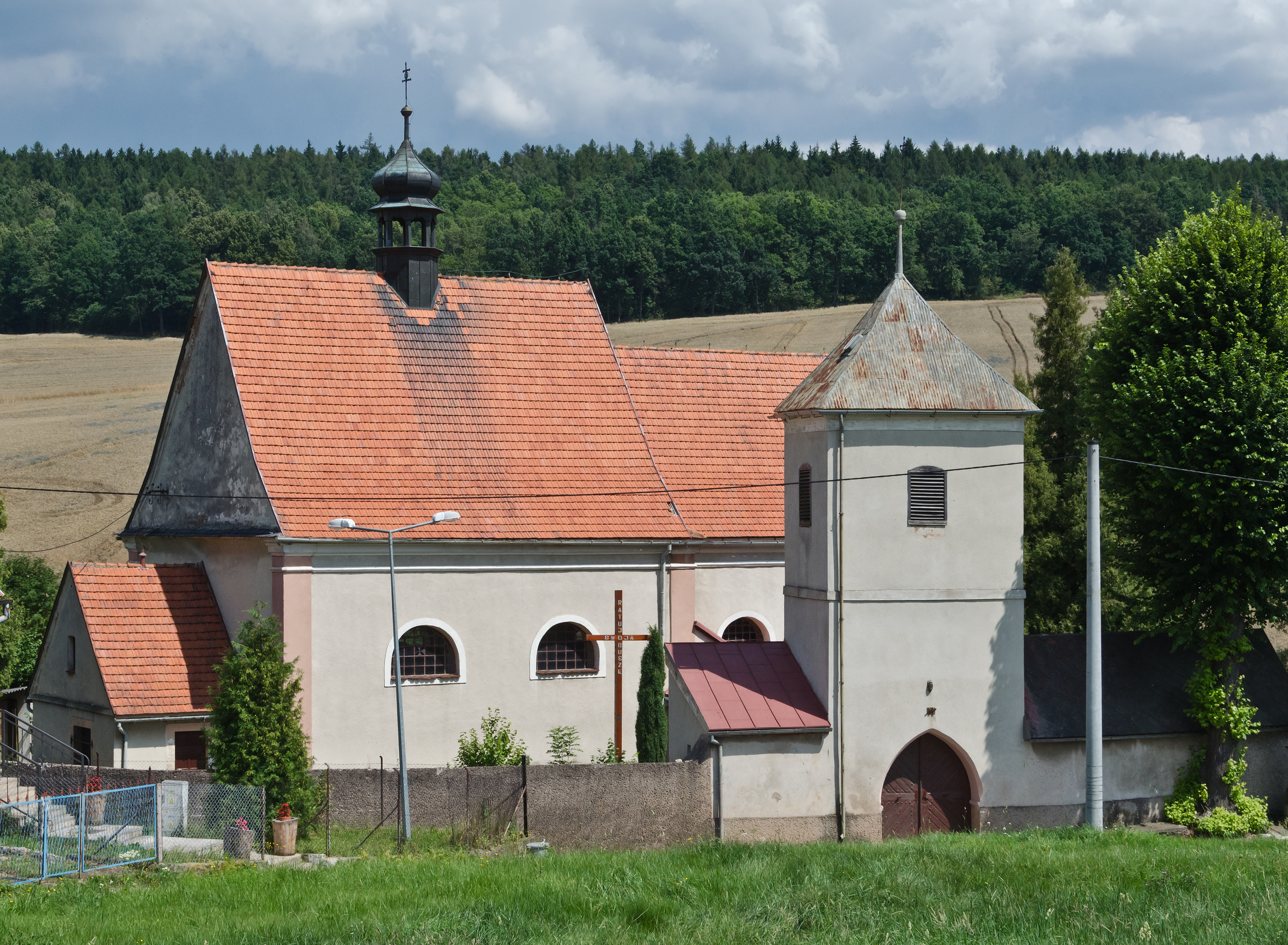 Raszków, kościół fil. p.w. śś. Piotra i Pawła, 1 poł. XVI, 1689-1690